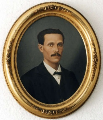 Retrato hecho con motivo de su boda en Cuba.